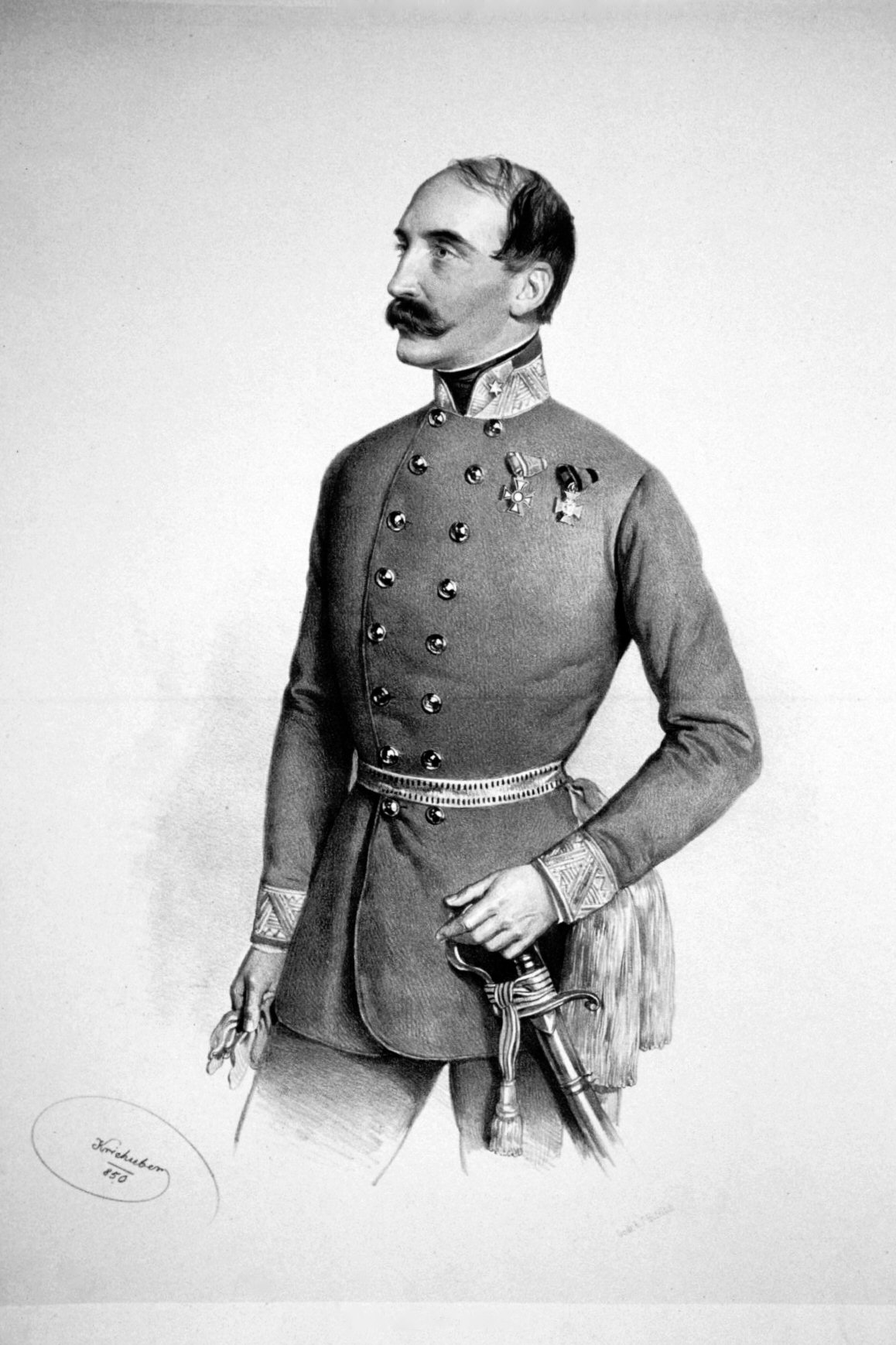 Anton Graf Jellacic von Buzim (1807-1875), k. k. Feldmarschallleutnant